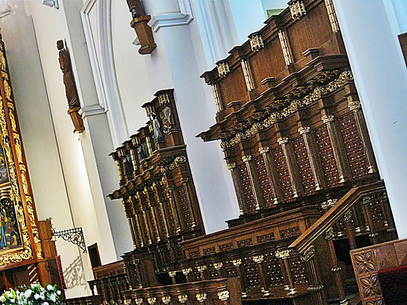 Częstochowa - bazylika katedralna św. rodziny, stalle